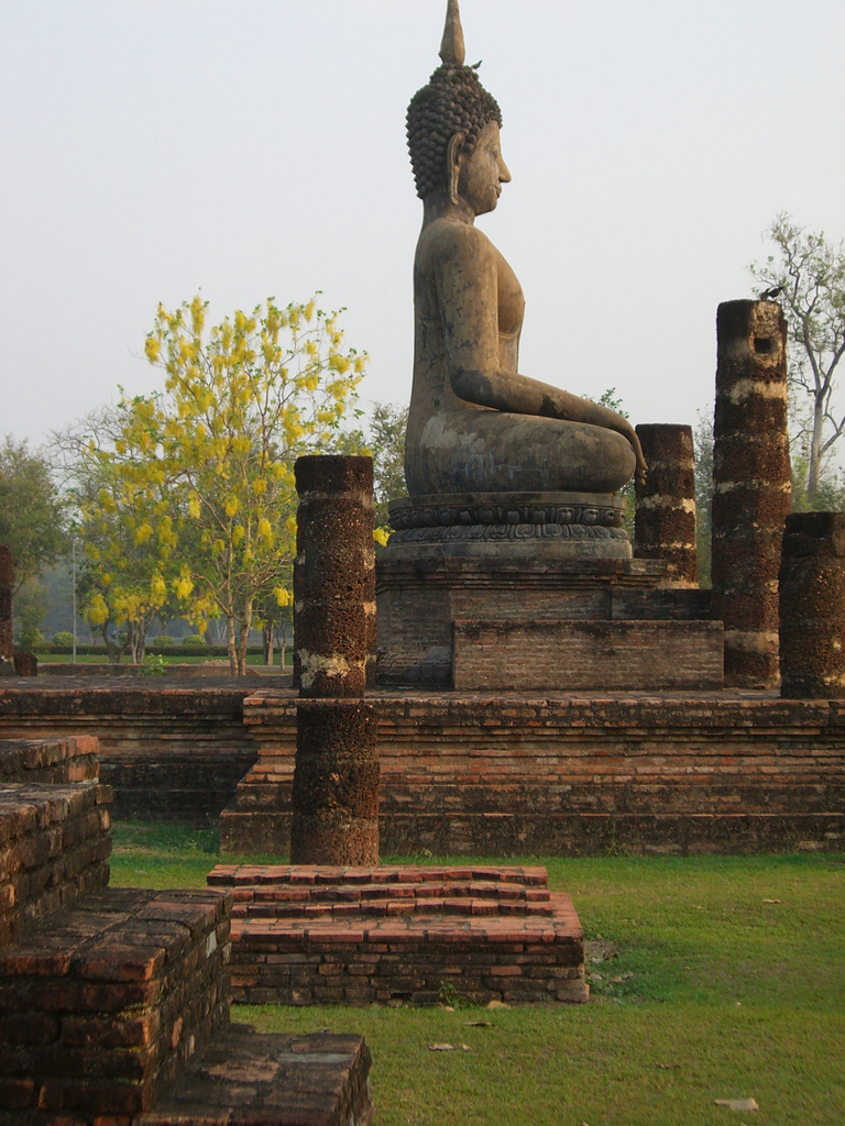 Boeddha in Sukhothai Nasionale Park.